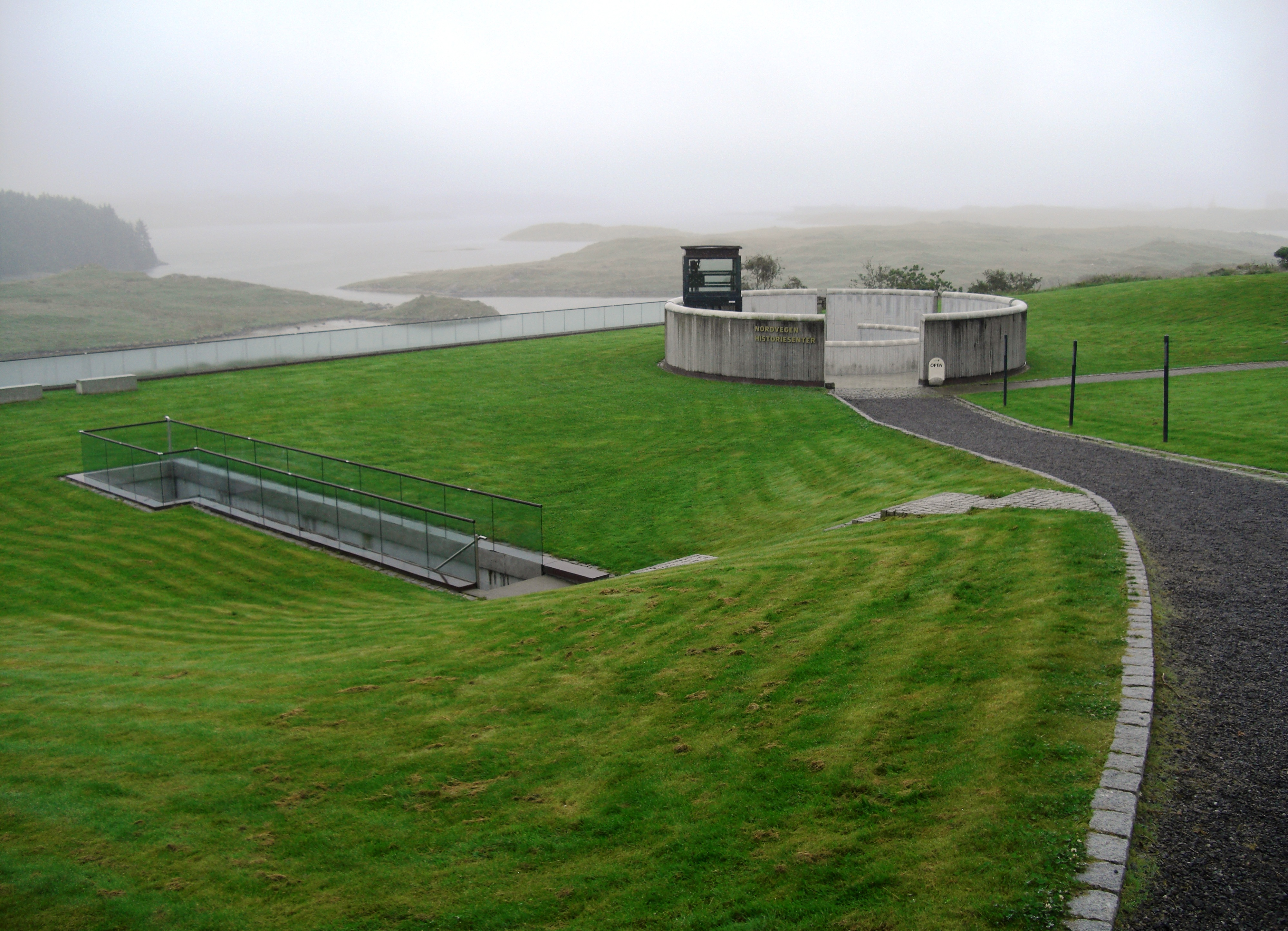 Nordvegen Historiesenter